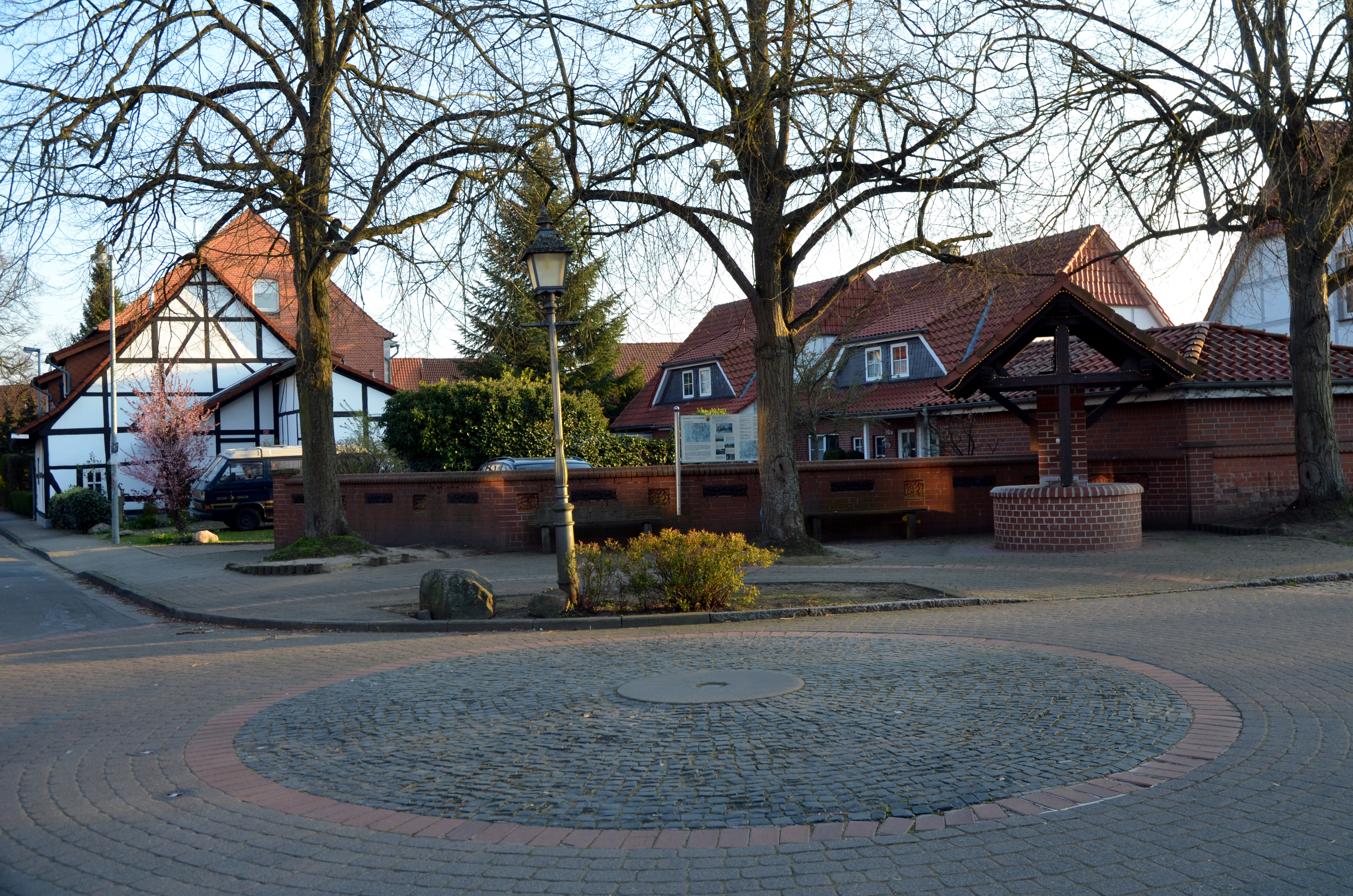 Die 1987 feierlich eröffnete Platzanlage Am Thie Ecke Kirchstraße in Grasdorf (Laatzen), initiiert und nach Entwürfen des Grasdorfer Architekten, Kommunalpolitikers und Heimatforschers Helmut Flohr gestaltet